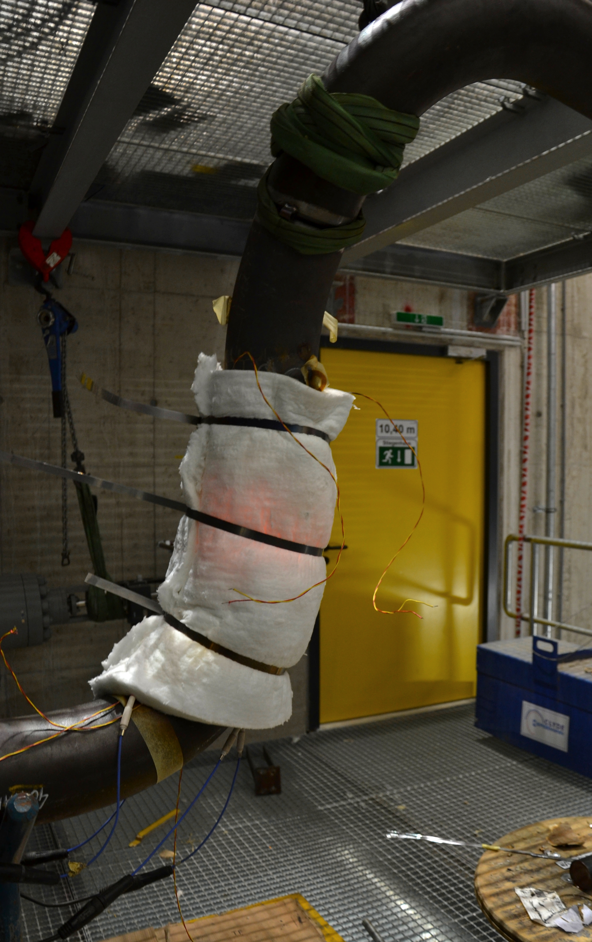 Glühen einer Frischdampfleitung aus 1.4903 X10CrMoVNb9-1 A335-P91